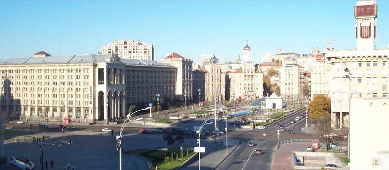 Main Plaza in Kiev, Ukraine.